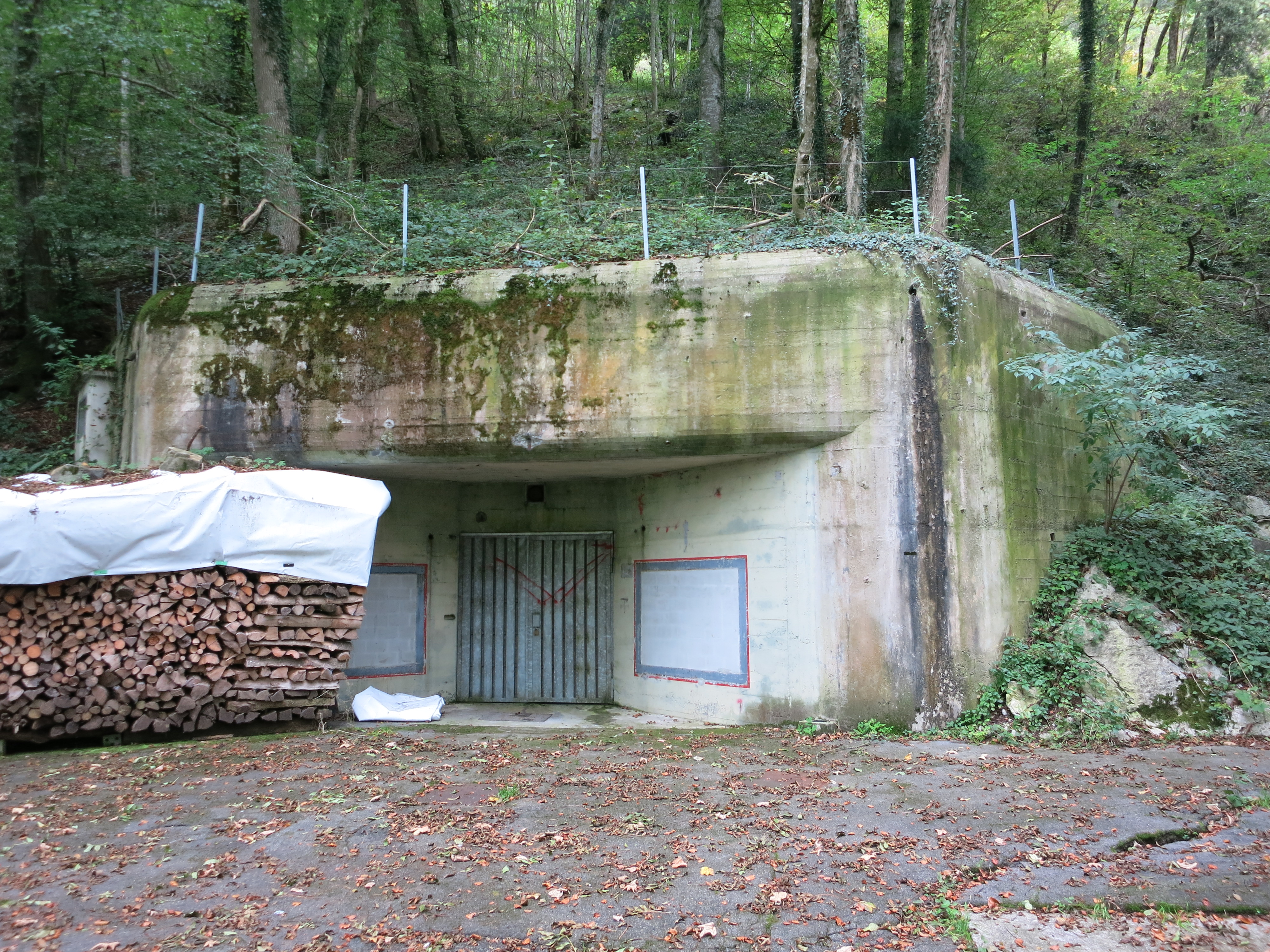 Festung Mueterschwanderberg, Ennetmoos NW, Schweiz